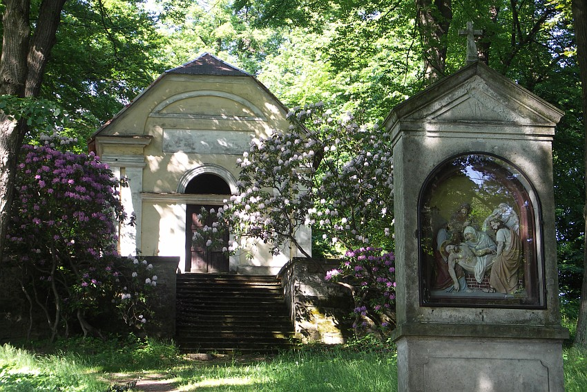 Křížový vrch near Cvikov (Zwickau in Böhmen), Czech Republic